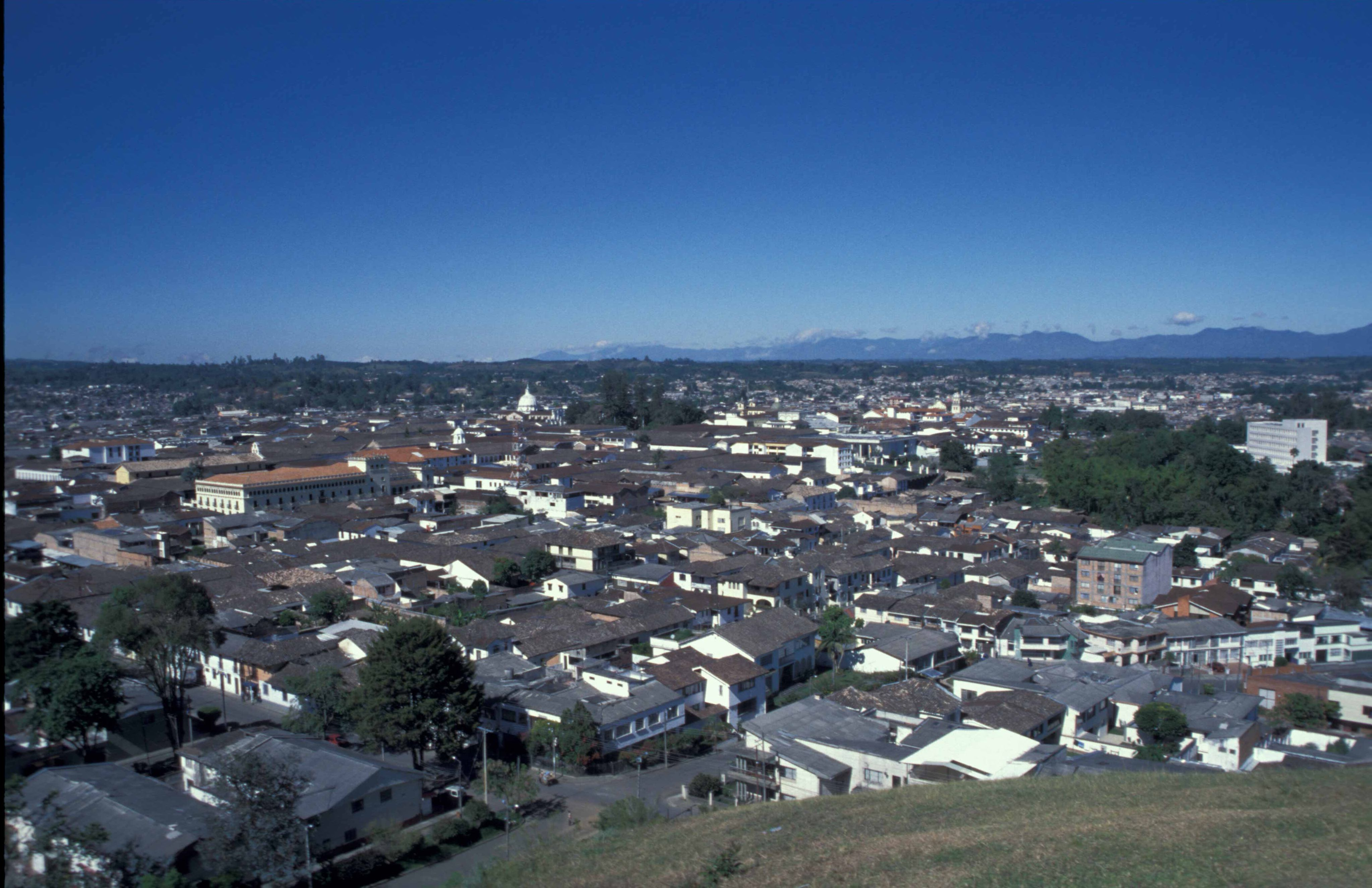 La ciudad de Popayan Colombia, vista desde el morro